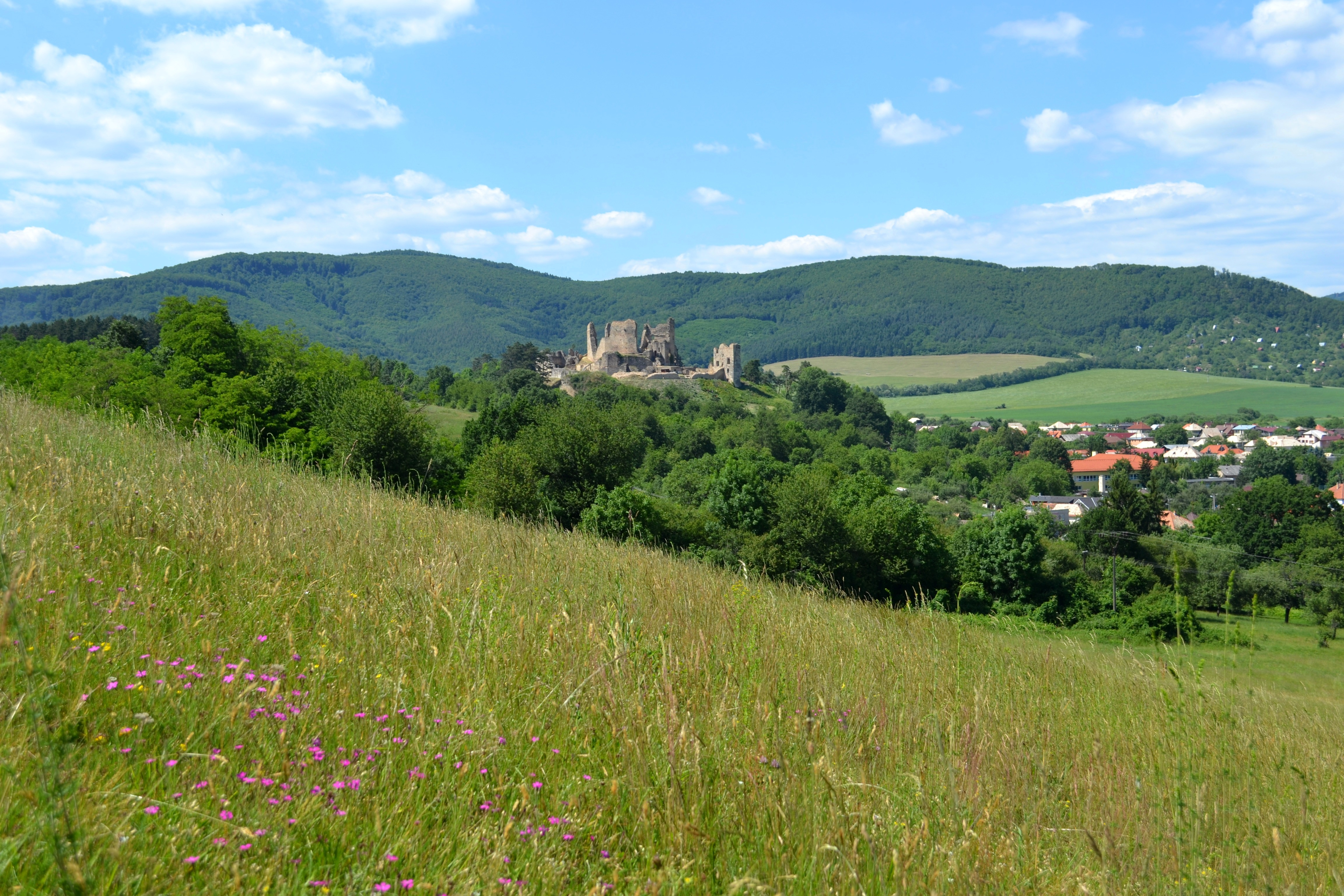 Divínsky hrad postavili koncom 13. storočia